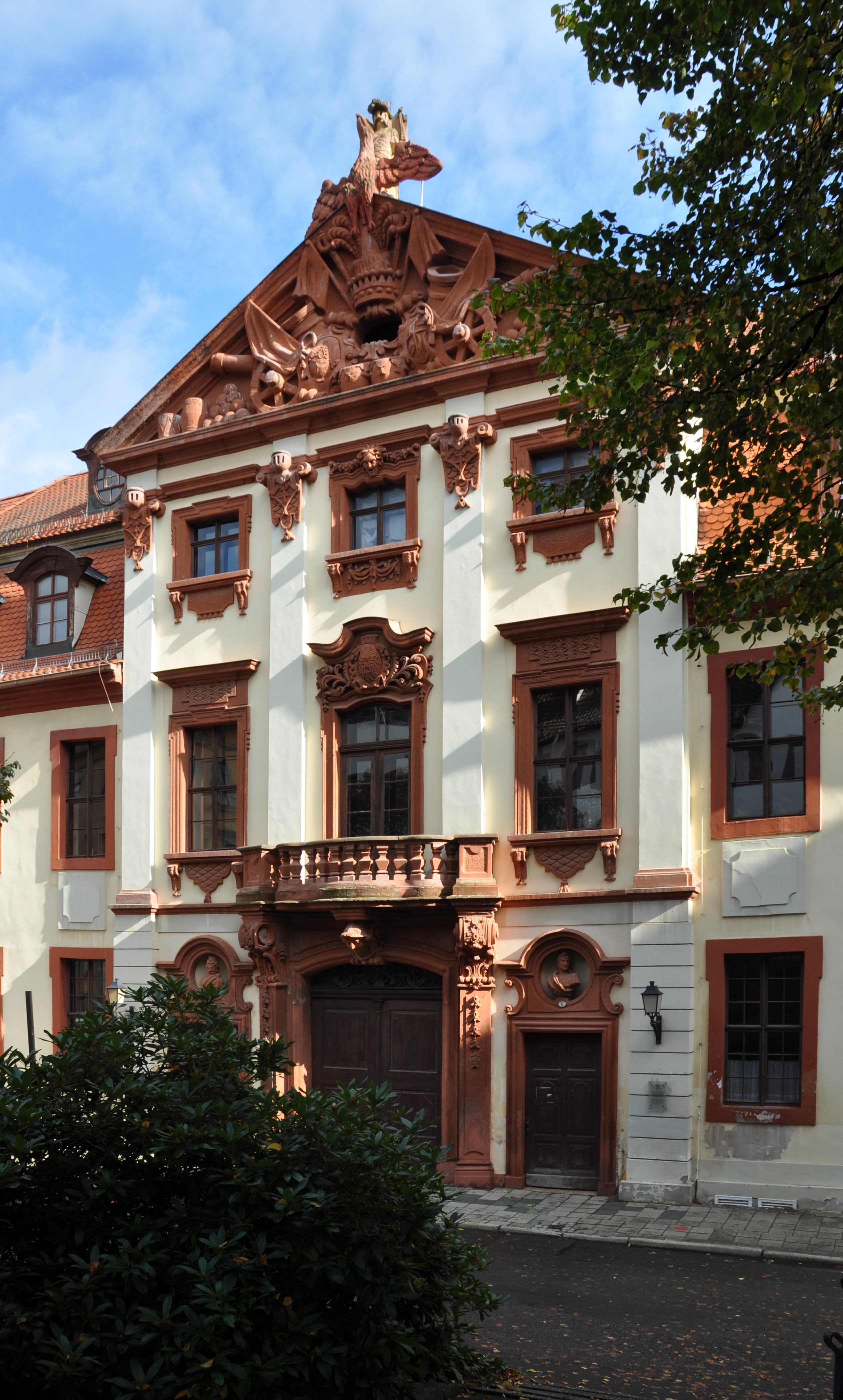 Altenburg, Brühl, Seckendorffsches Palais